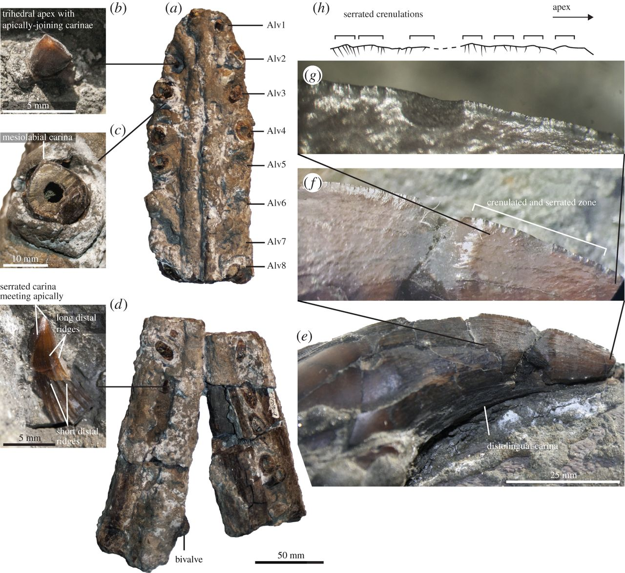 Dentition and mandible of YKM 68249/1-10. (a) Mandible in dorsal view. (b) Replacement tooth in the 2nd alveolus, showing the trihedral cross section. (c) Base of the 3rd alveolus crown, showing the marked mesiolabial carina (the crown fragment has been glued slightly off its original position). (d) 1st or 2nd post-symphysis replacement tooth, showing distal ridges and serrated carinae. (e,f) Successive zooms of the mesiolabial carinae of a broken off crown lying on the ventral surface of the symphysis. (h) Schematic diagram of the carination, drawn from (f). Note the serrated crenulations.